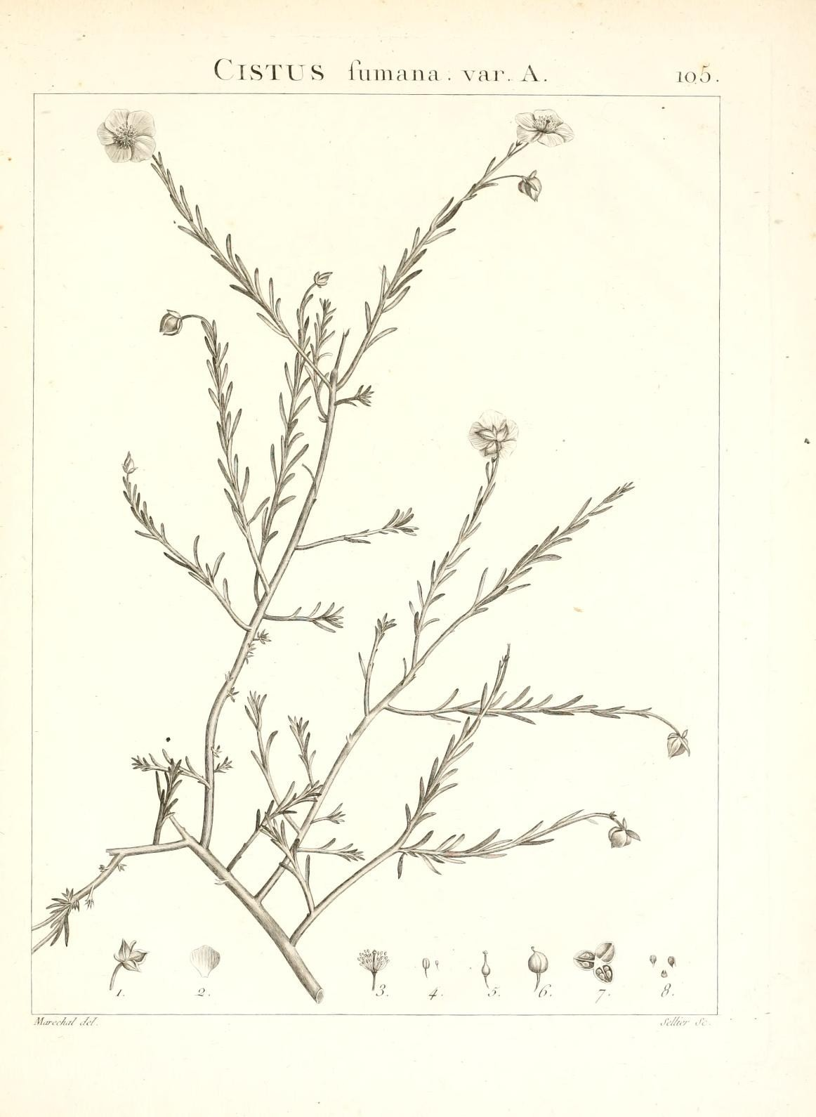 ( ISTUS liiinana . vai\ A. IQO M^tvA.i/ ,/c/. Je//i.r dl-.